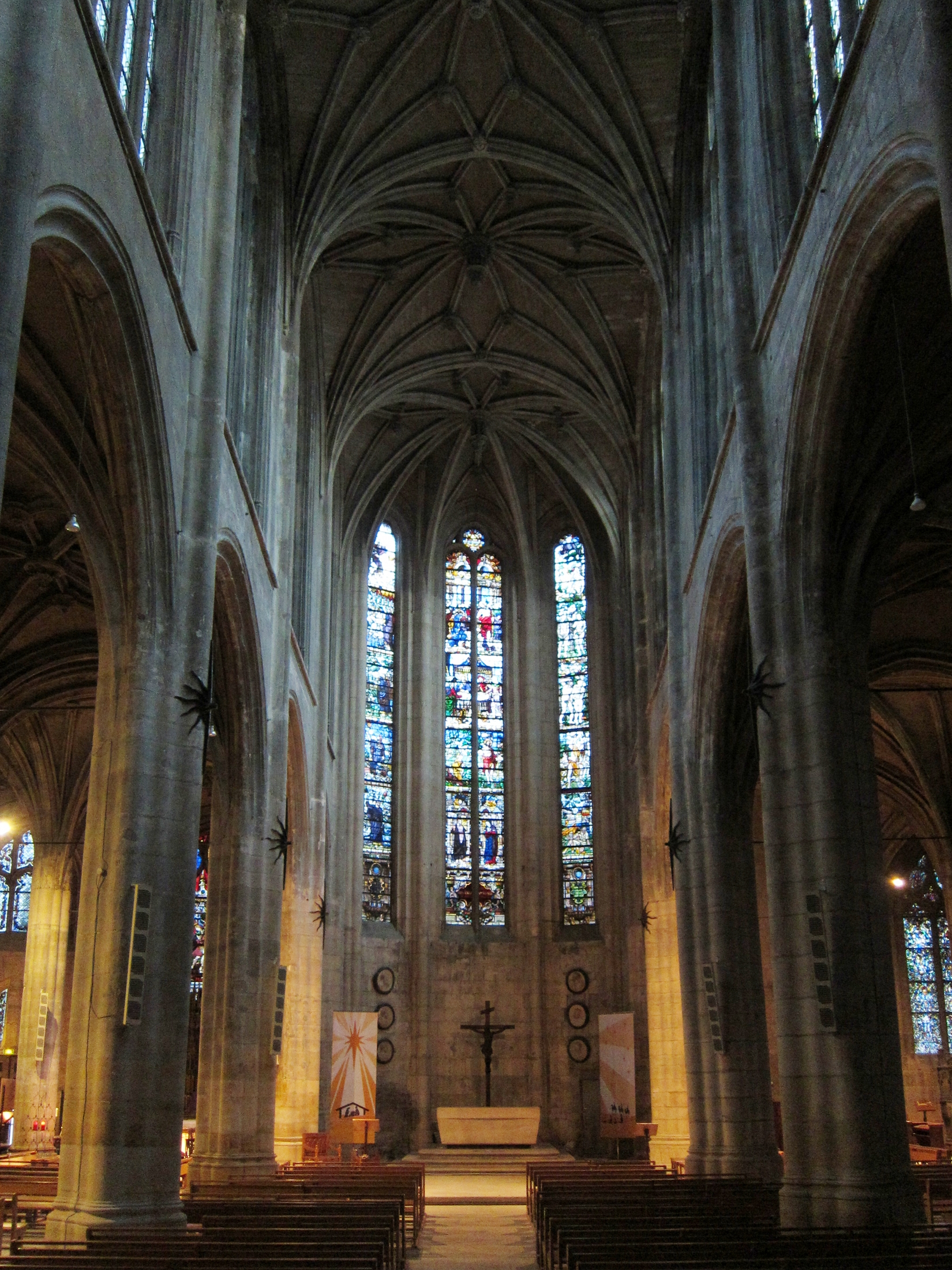 La nef de l'Église Saint-Aspais de Melun.